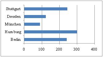 Balkendiagramm bei nominalskalierten Merkmalen (z.B. Wohnort)